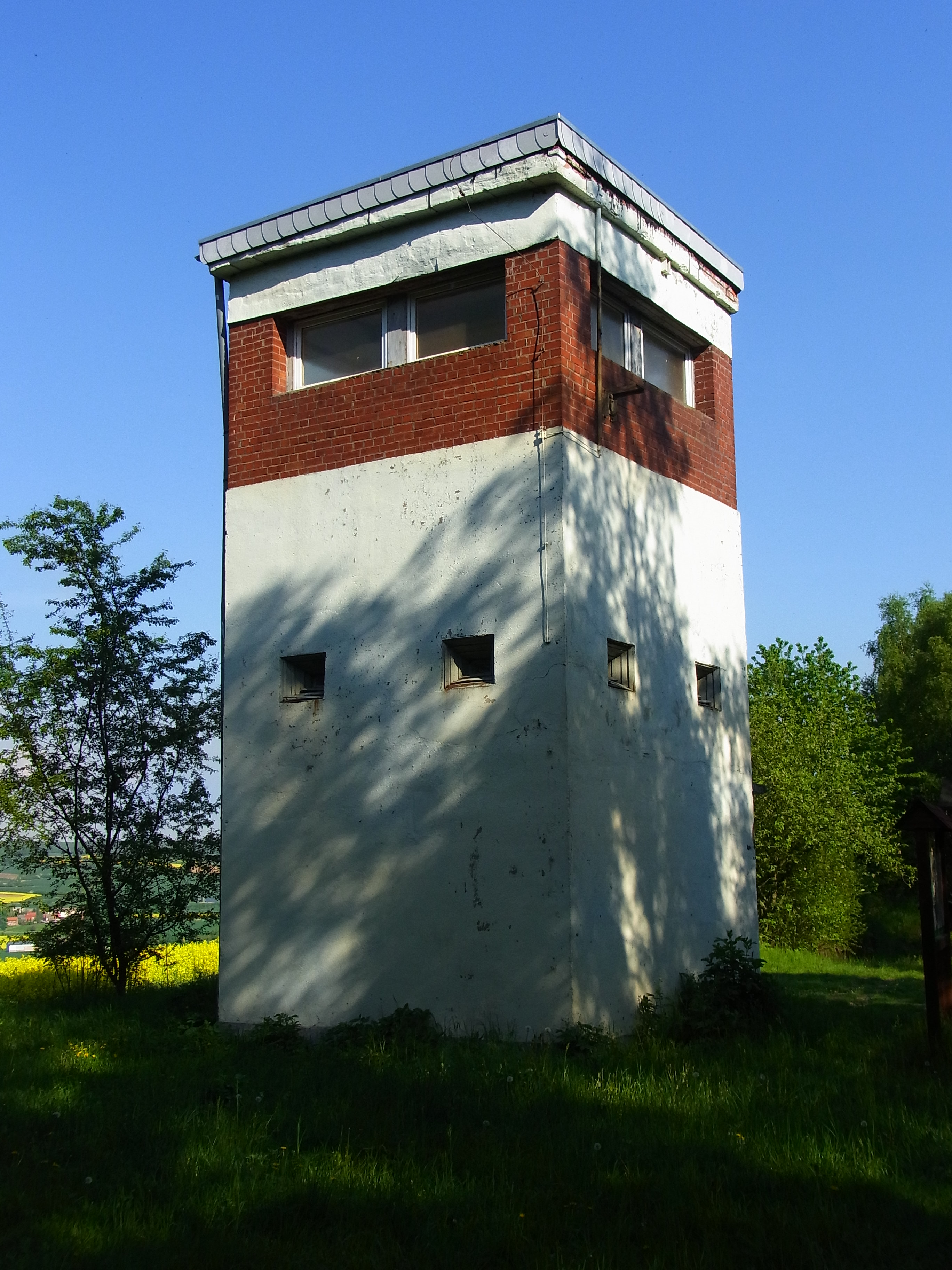 Dieser 8 m hohe Turm wurde 1975 als Befehlsstelle für diensthabende Offiziere im Grenzstreifen erbaut.